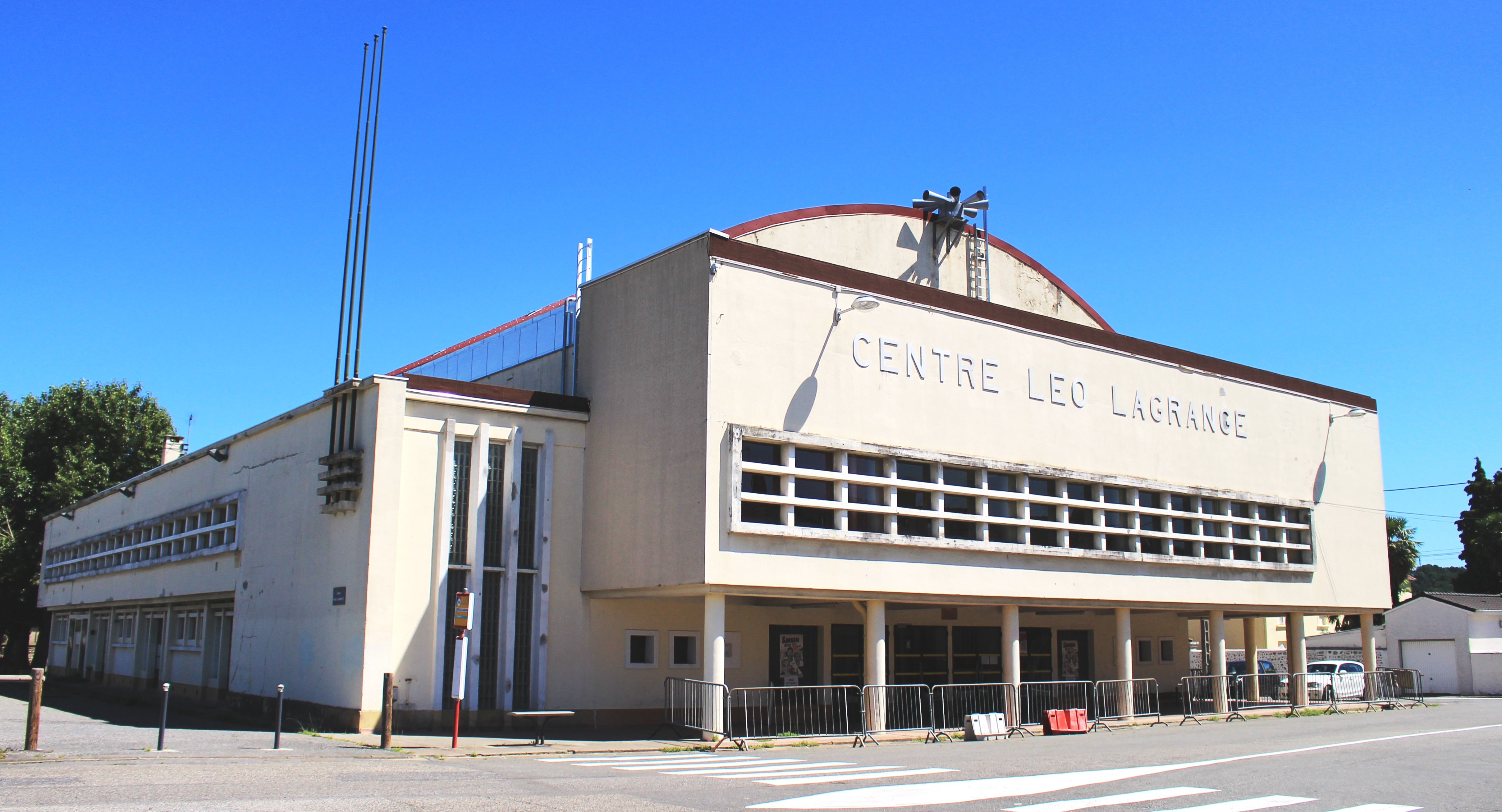 Salle des fêtes de Séméac (Hautes-Pyrénées)